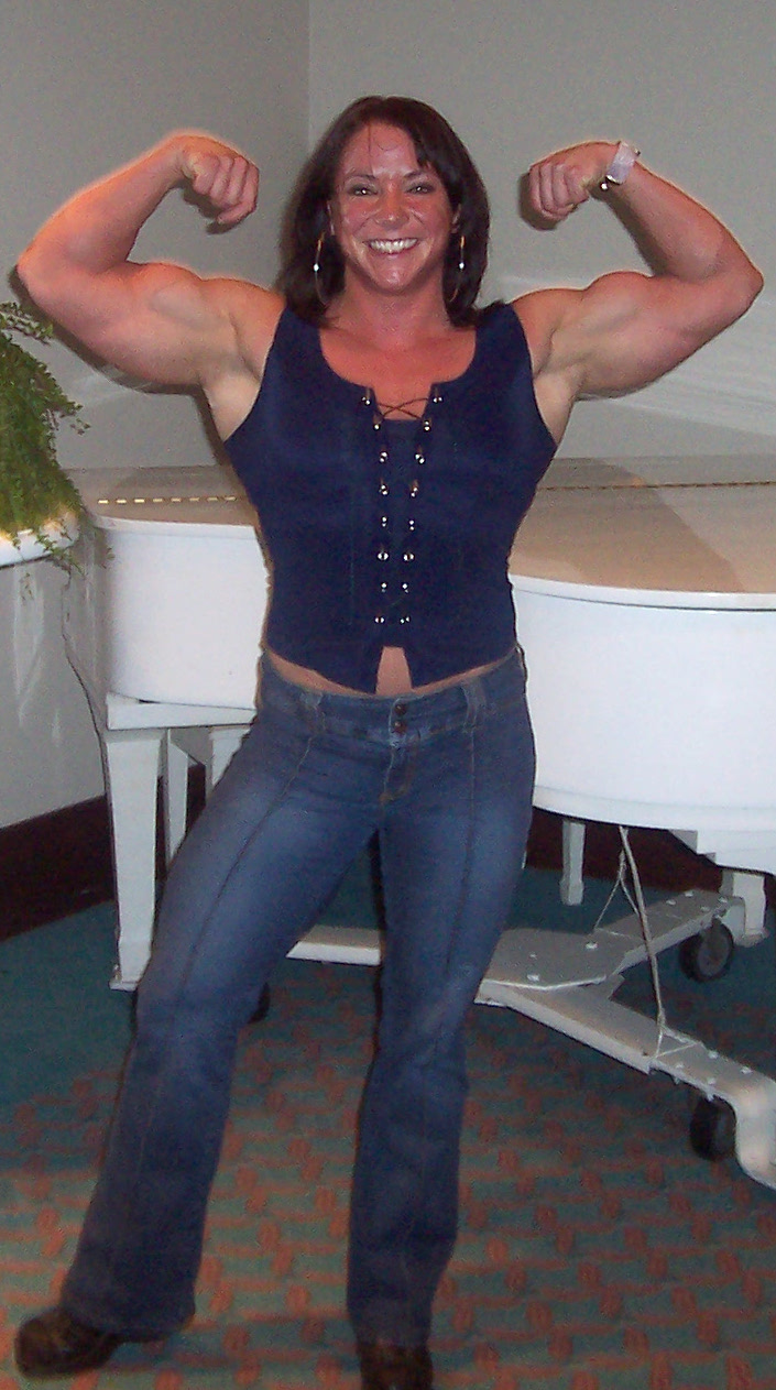 Sarah Dunlap